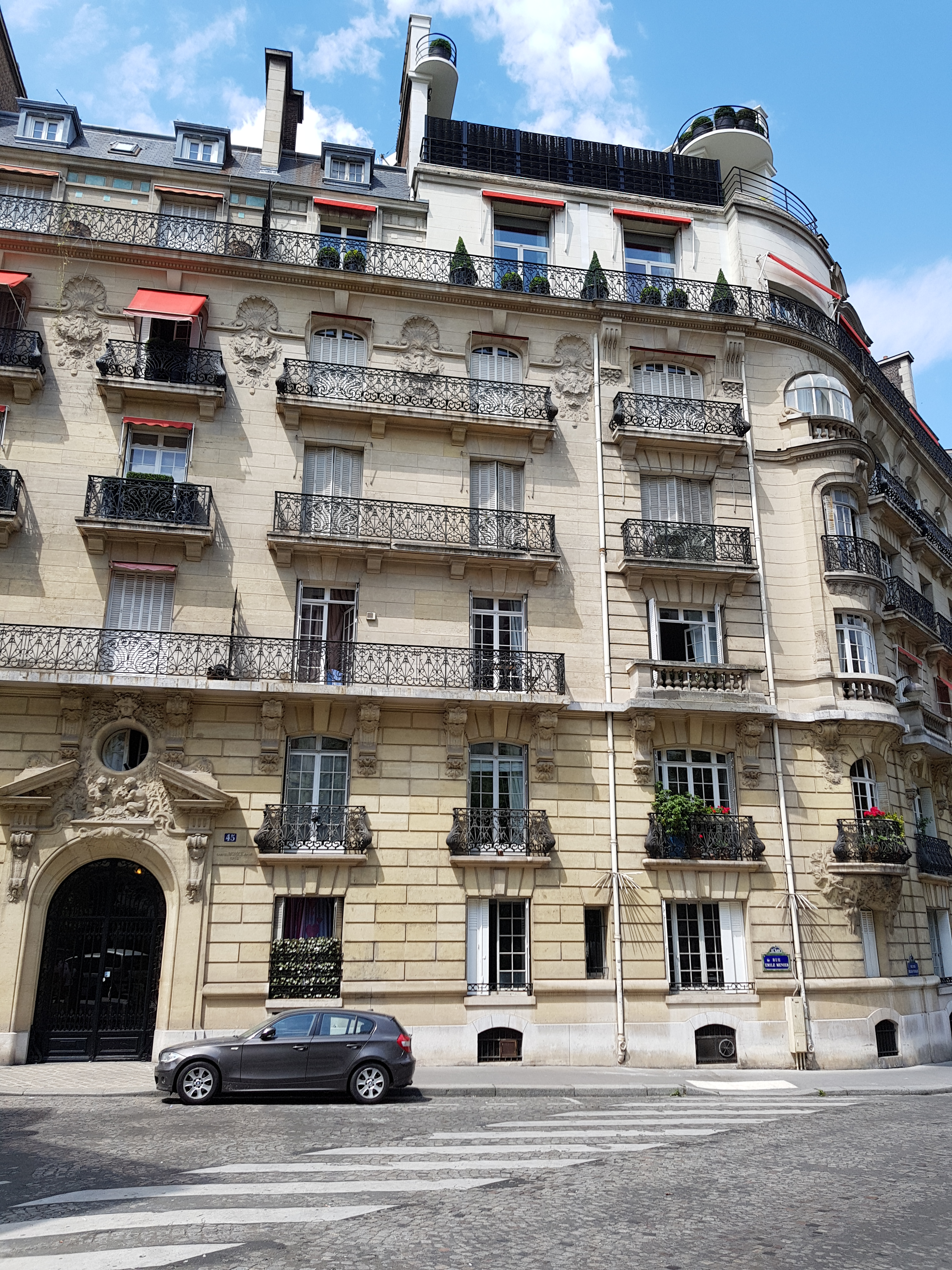 Immeuble du 45 rue Emile-Menier, Paris 16e.